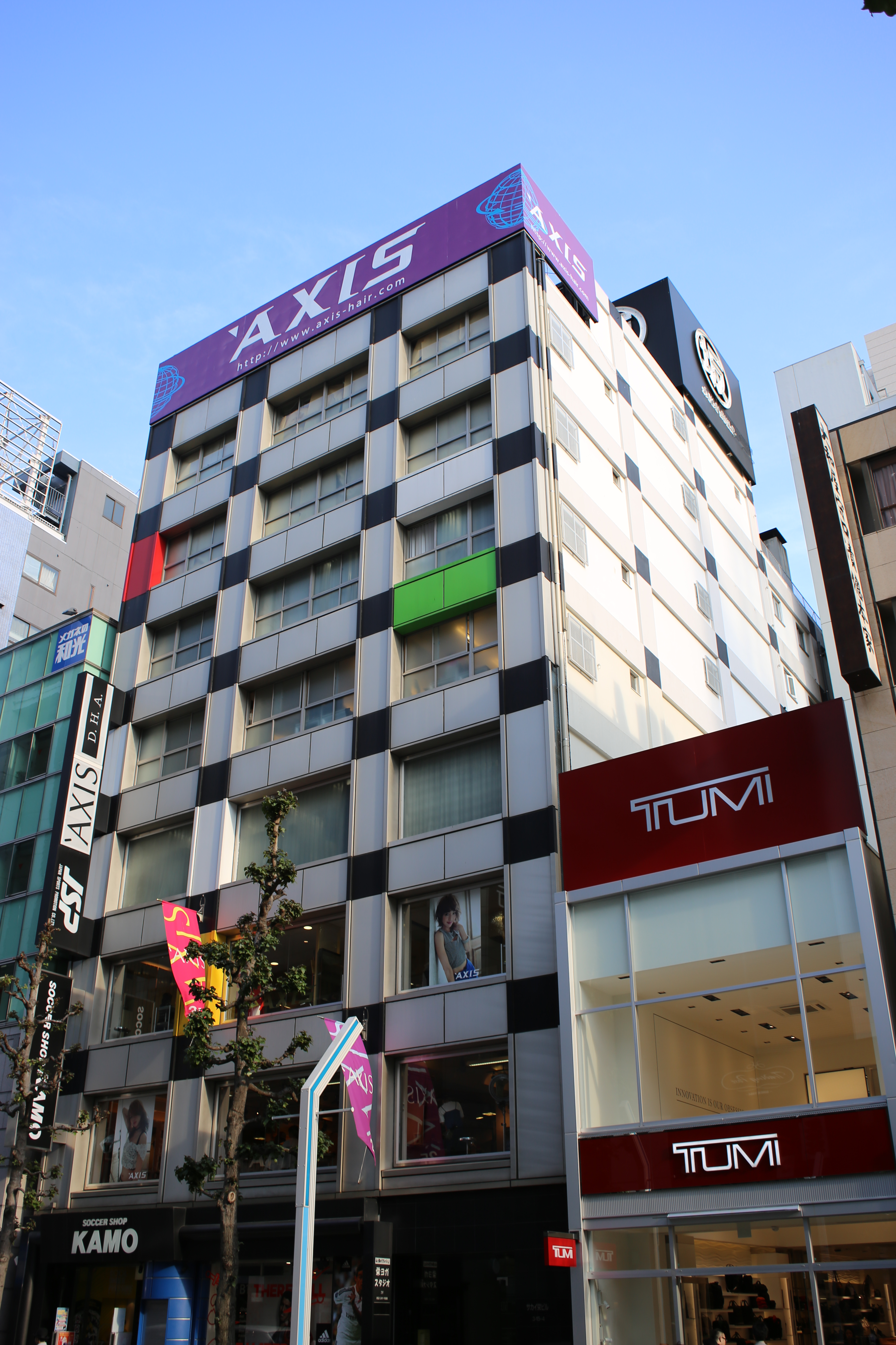 名古屋市中区栄三丁目のサカイ栄ビルを北側公道東側より撮影。